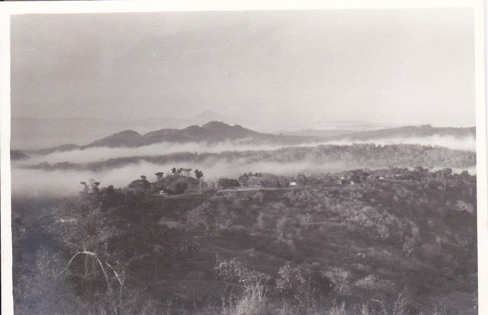 Atabai --1970--Um nascer do dia,por volta das 5 horas,com as suas nuvens baixas.A meia encosta destinguem-se instalações do Esquadrão de Cavalaria 6